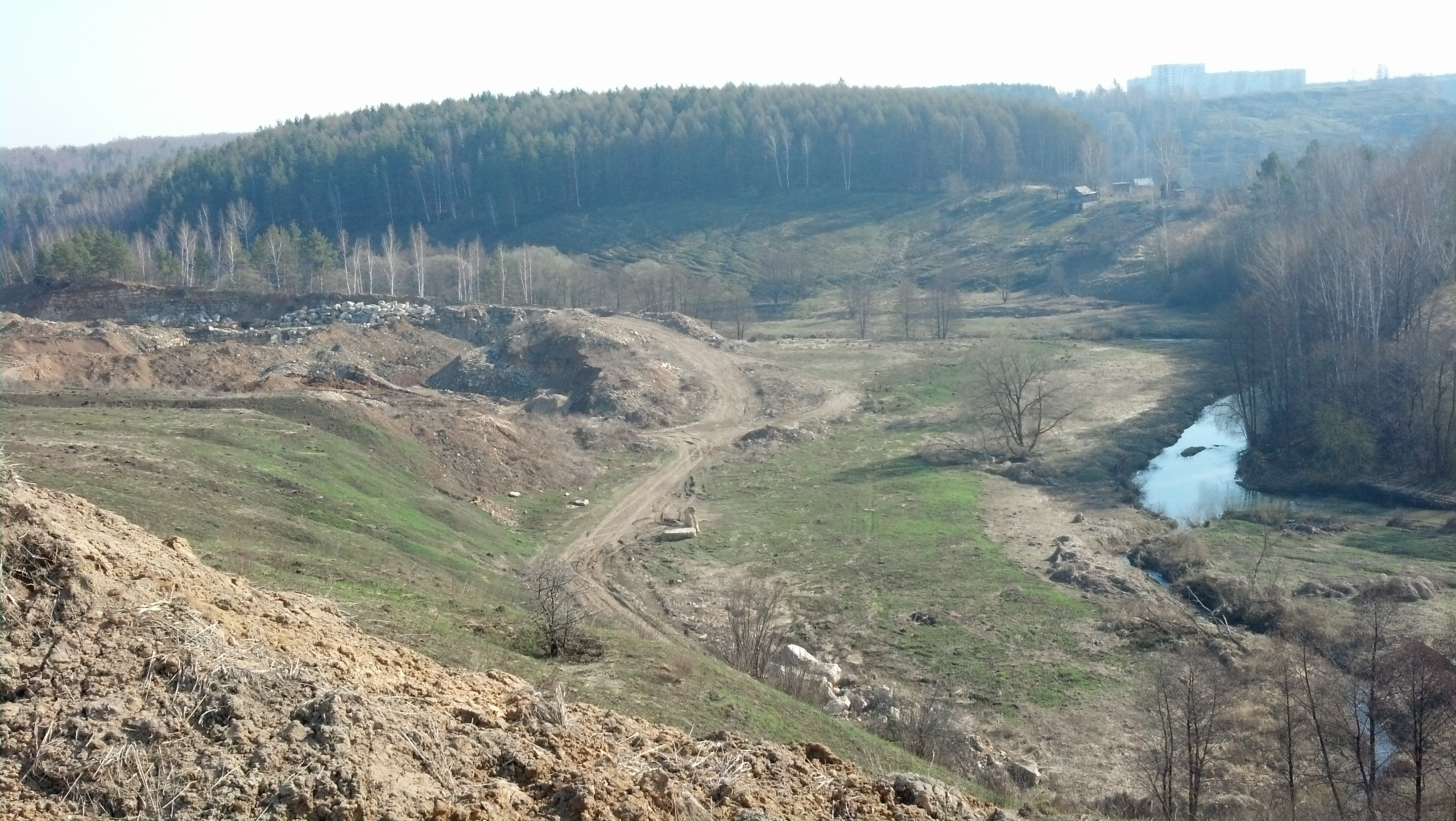 Весенняя Мышега